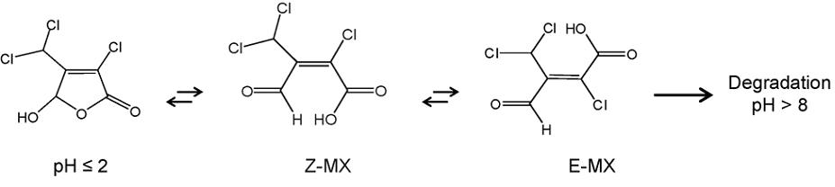 Dégradation du Mutagen X par rapport au pH